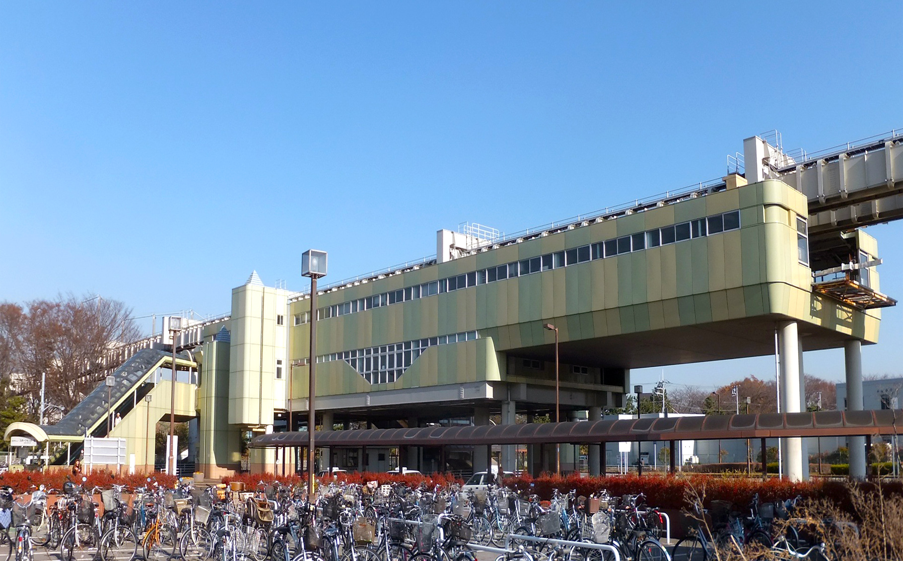 千葉都市モノレールスポーツセンター駅